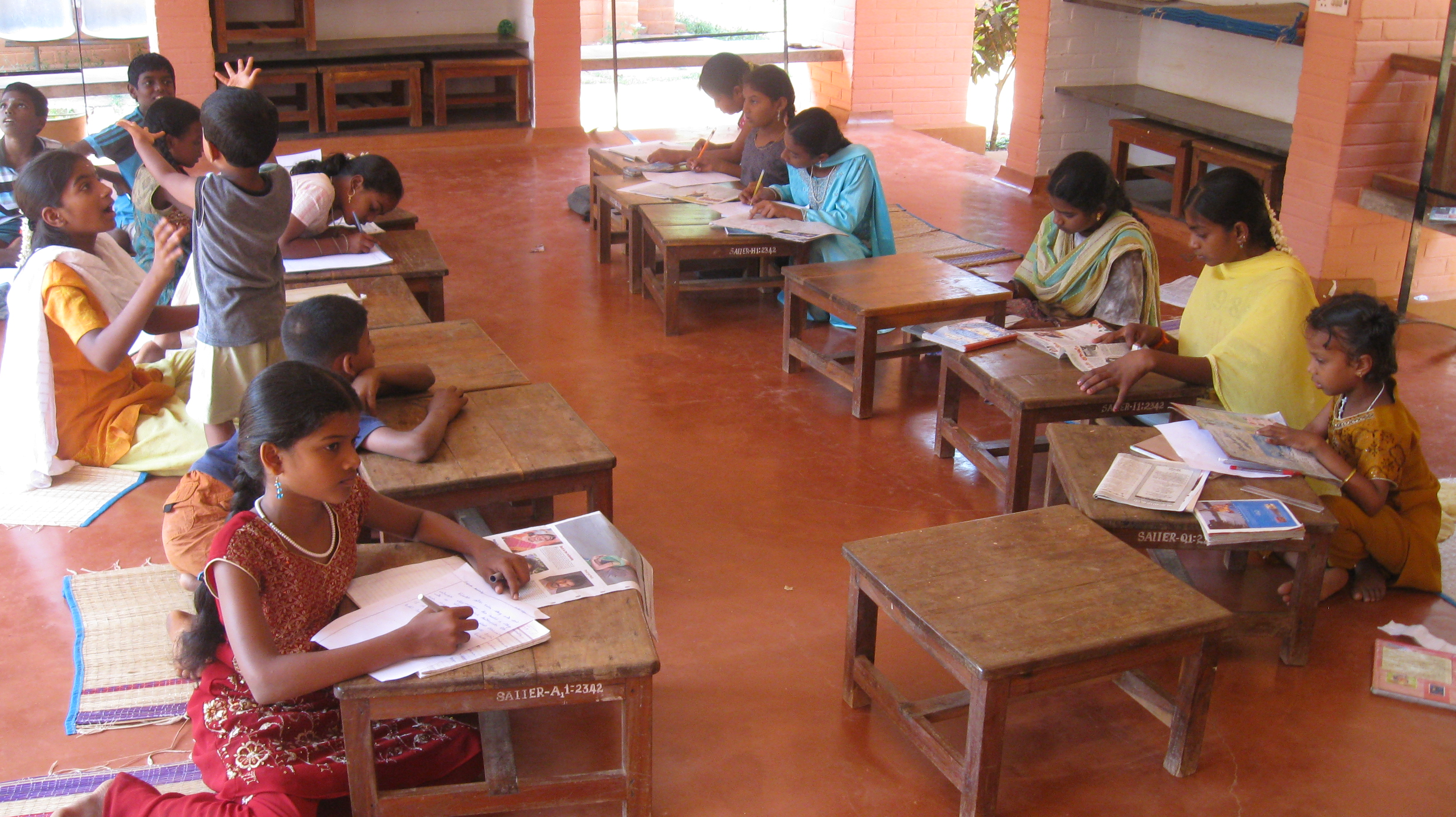 தமிழகத்துப் பள்ளிக்கூடத்தில் ஒரு காட்சி